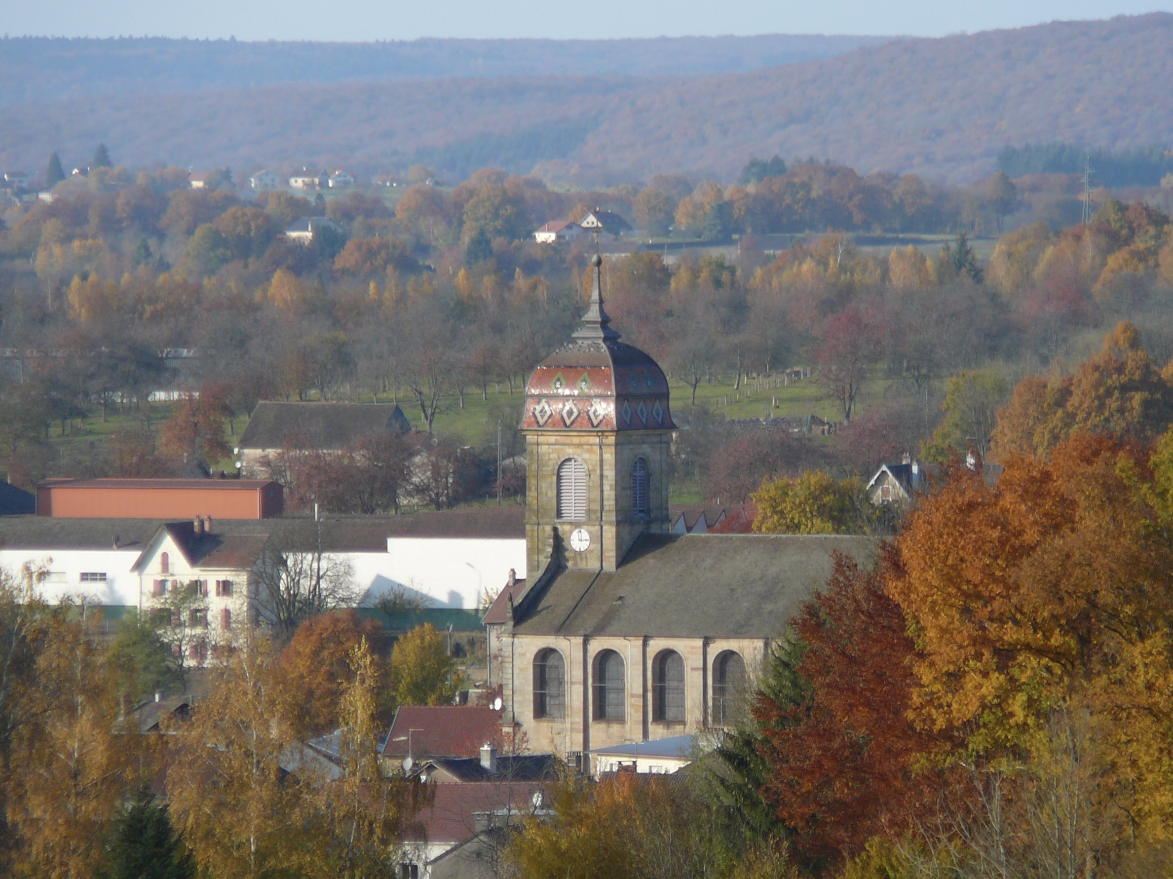 Eglise de Fougerolles (Haute-Saoône)